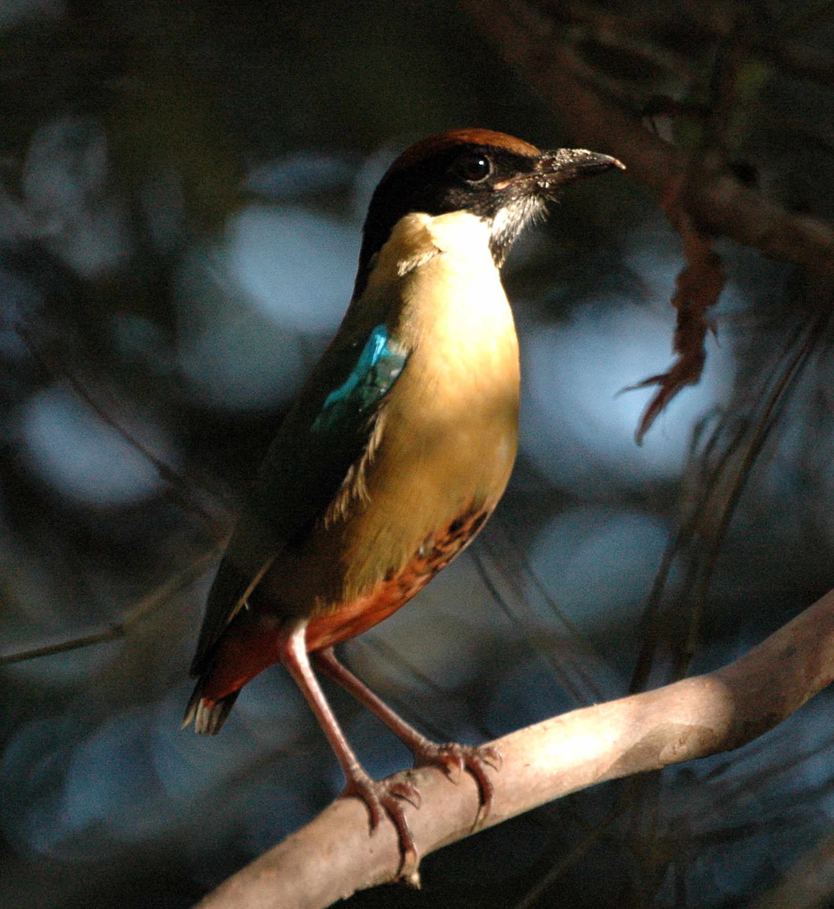 Noisy Pitta (Pitta versicolor) Inskip Point, SE Queensland, Australia